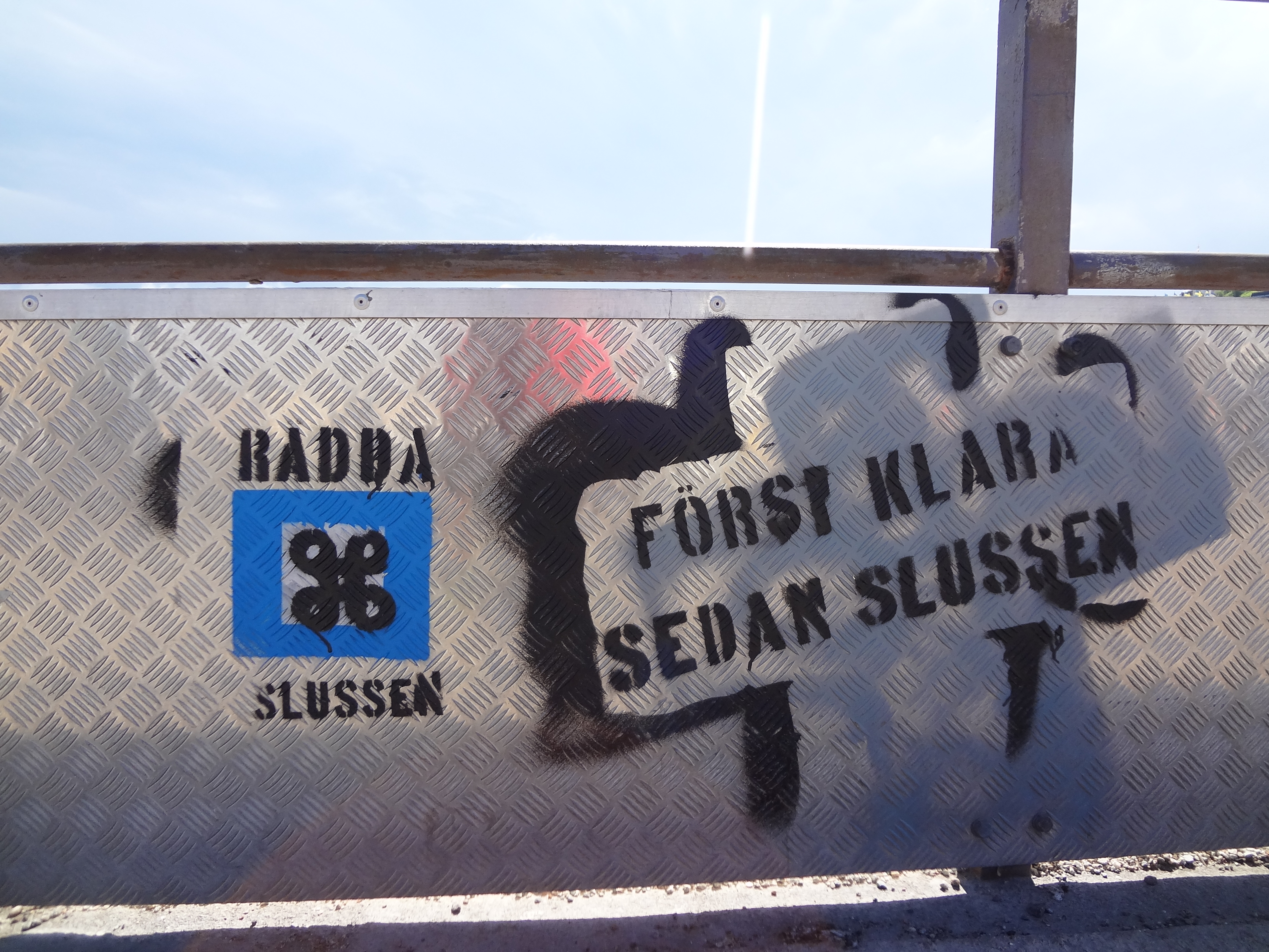 Klotter vid Slussen i Stockholm, protest mot den planerade ombyggnationen.